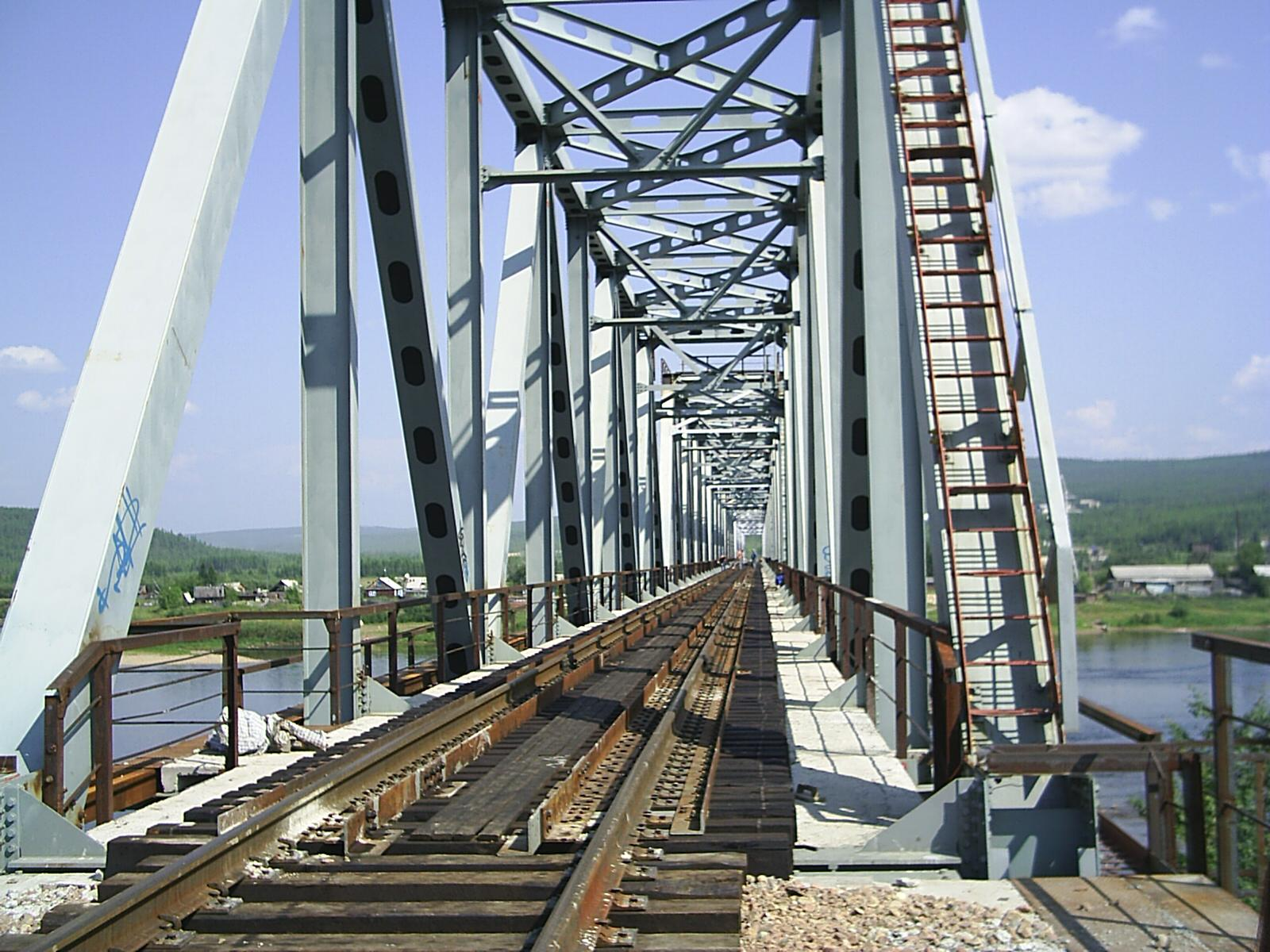 Железнодорожный мост через р. Алдан в г. Томмот, Республика Саха (Якутия), Россия. Вид с южной стороны